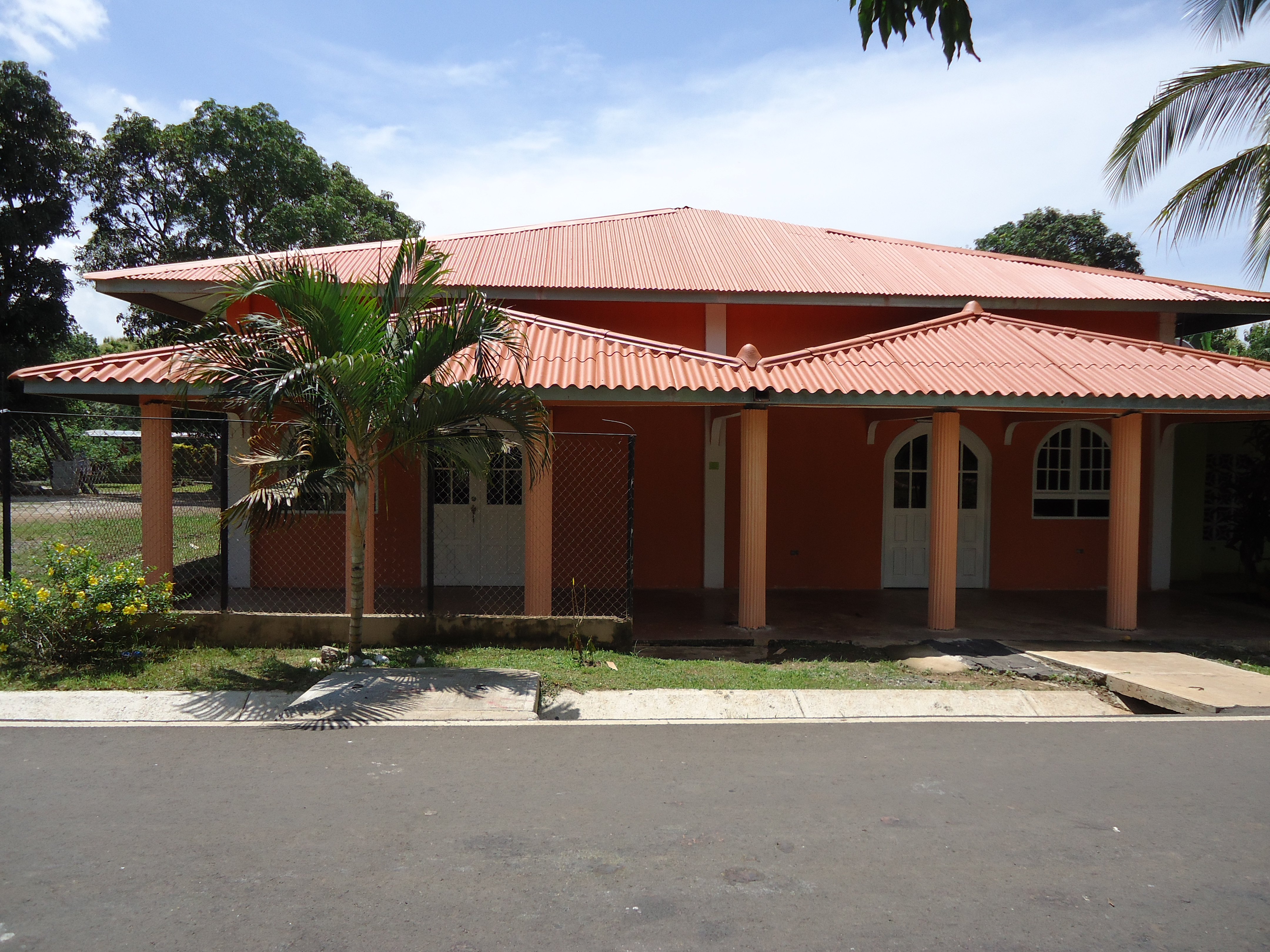 Una Obra bajo la Unción del Espíritu Santo, Desarrollandose bajo el Modelo de Jesús. Situated in Herrera, Panama